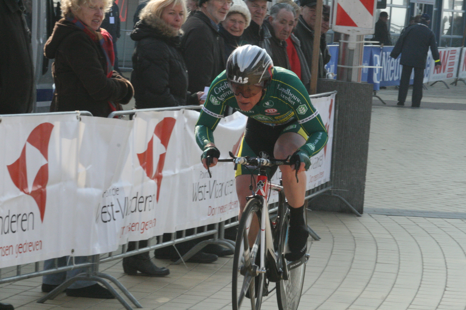 Driedaagse van West-Vlaanderen 2011, proloog in Middelkerke